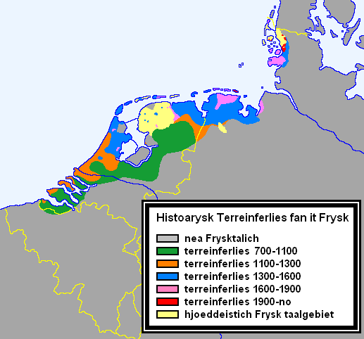 Seeltersk: Koarte fon dät ooldfräiske Toalgebiet